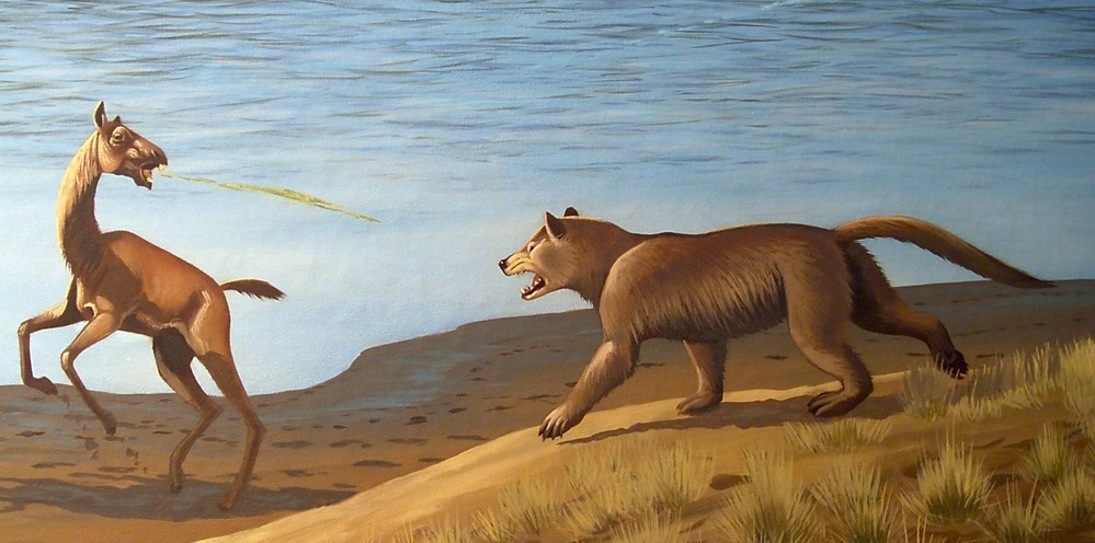 Amphicyon attacking Miolabis